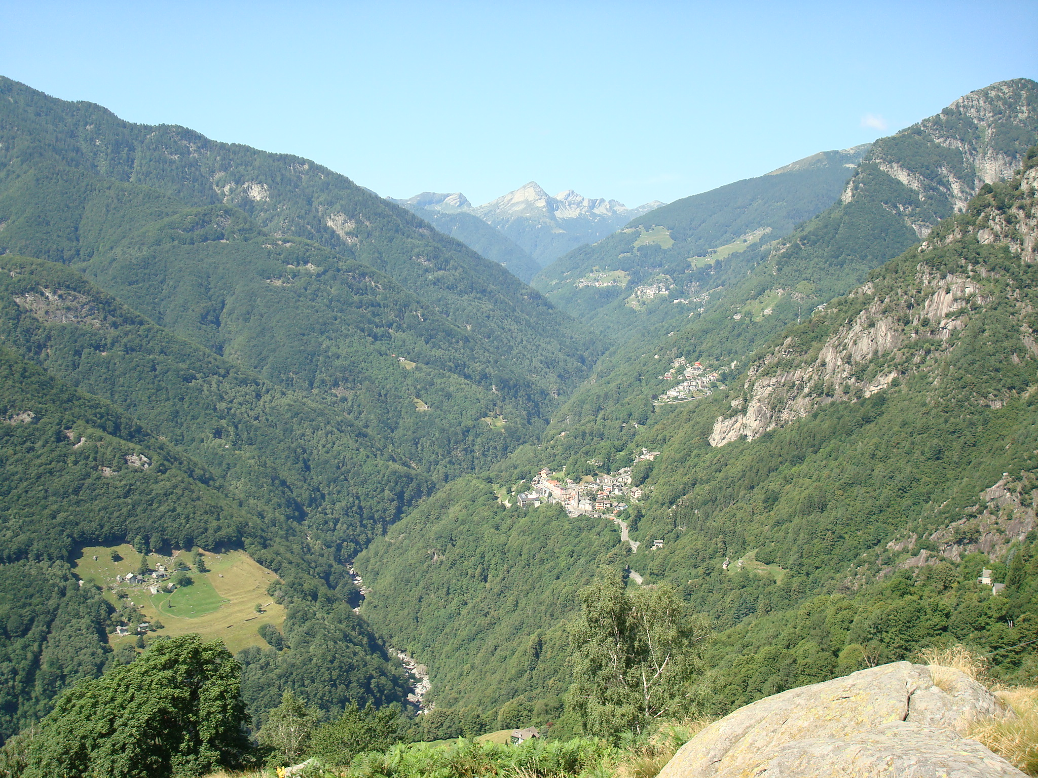 Panorama dal monte Piegn